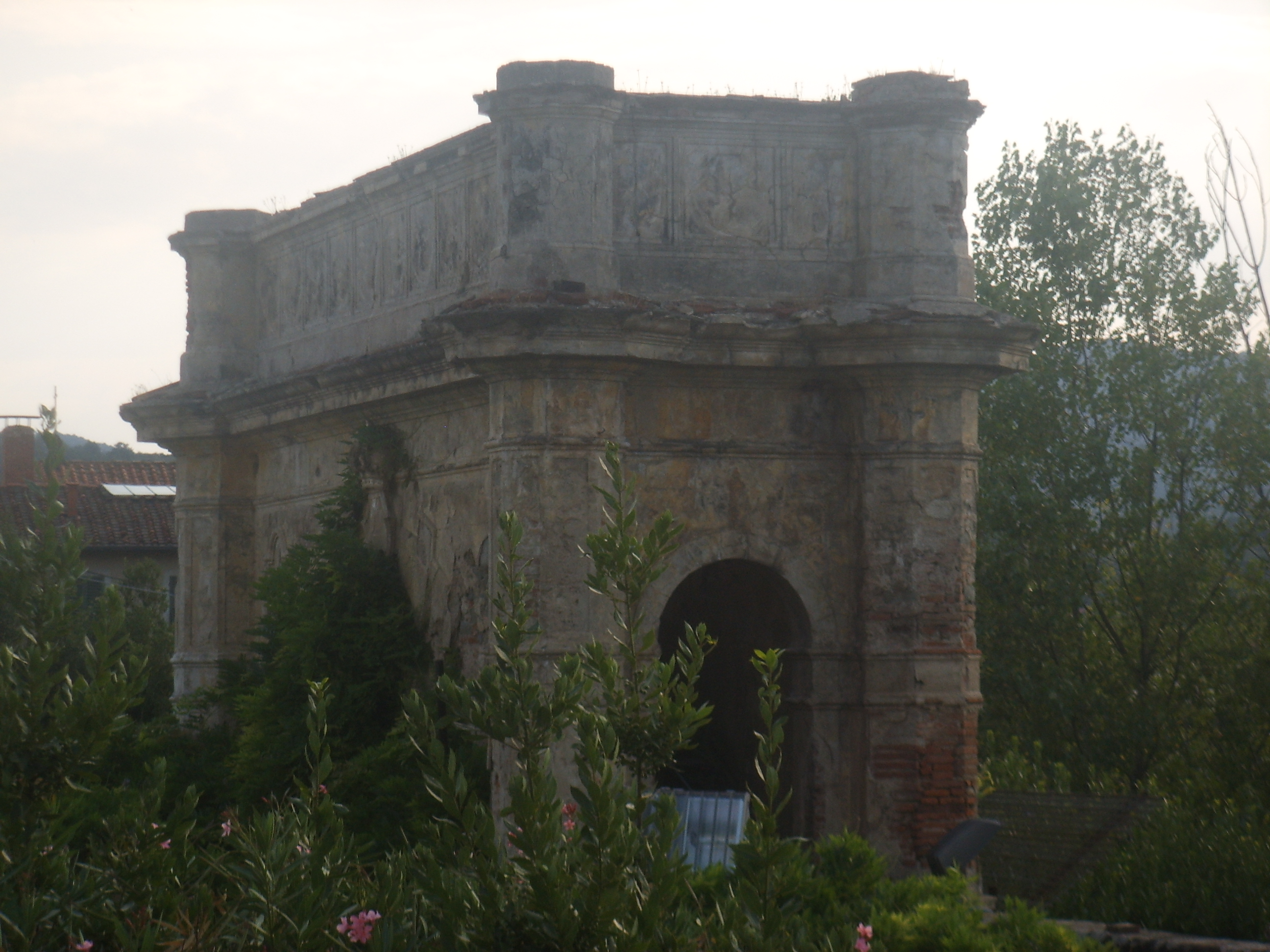 Poggio a Caiano Villa outside view in Poggio a Caiano, Italy